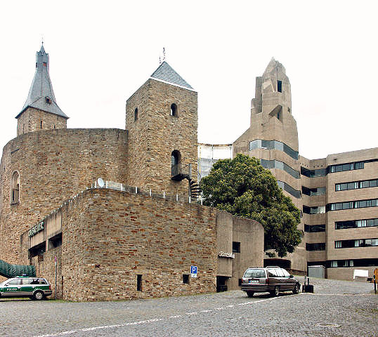 Bensberg Rathaus: Kombination von altem Schloss mit neuem Rathaus - Architekt: Prof. Gottfried Böhm